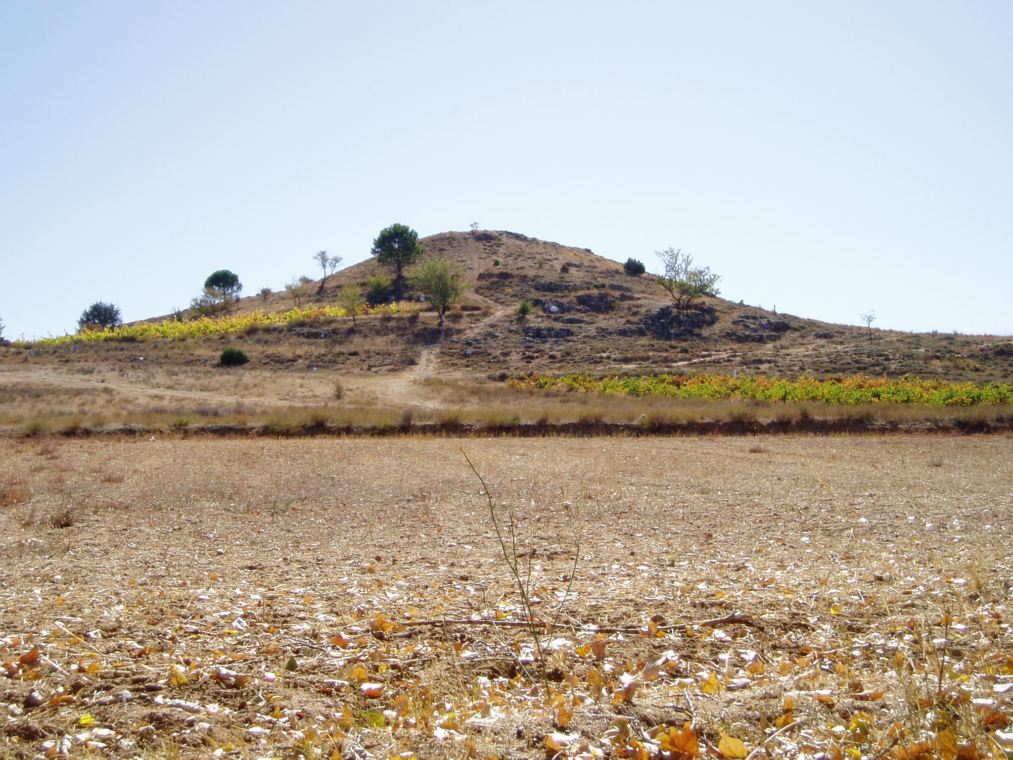 Imagen de la colina sobre la cuál está el vértice geodésico de San Bartolomé. Cerca de Sinovas (España).